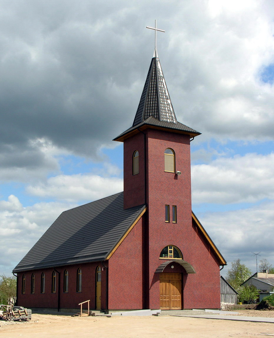 Ventos Švč. Mergelės Marijos Nekaltojo Prasidėjimo bažnyčia 2009 m. gegužės 5 d.